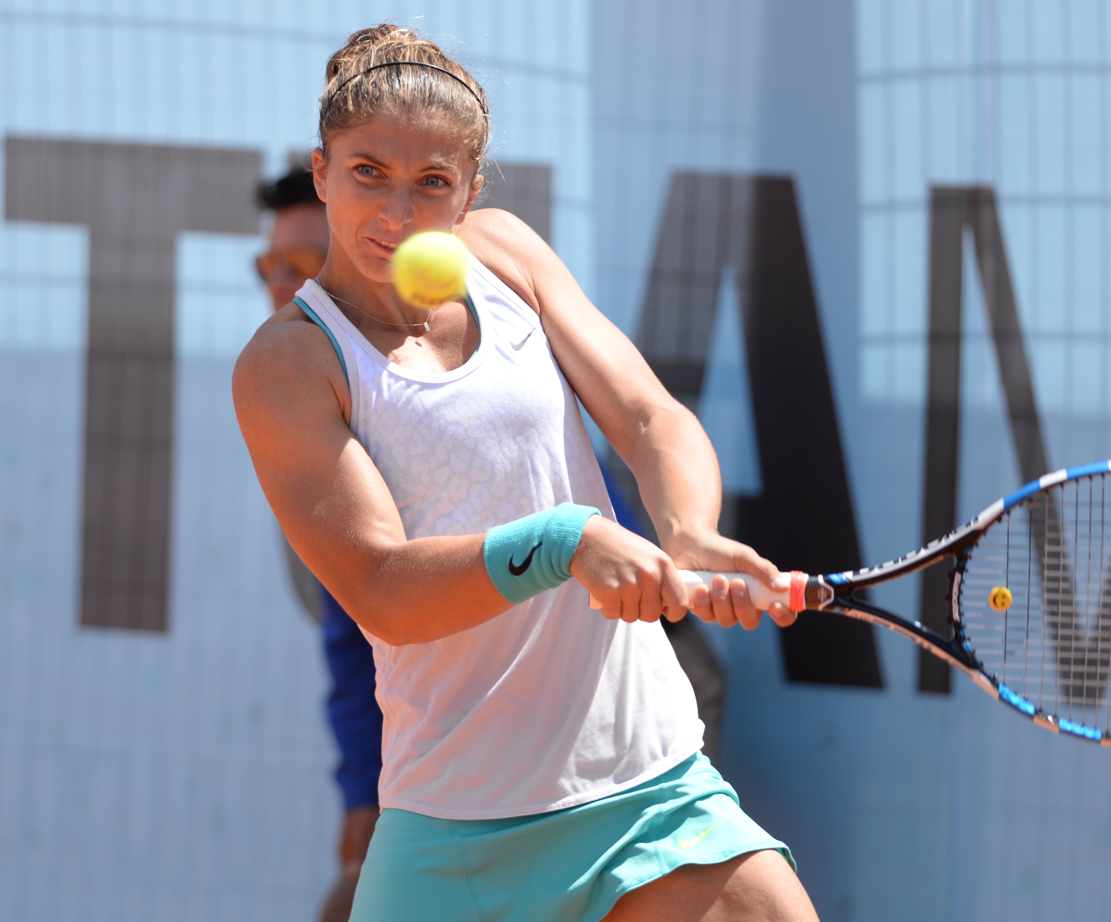 Sara Errani